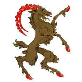 Hälsingebocken Hälsingland